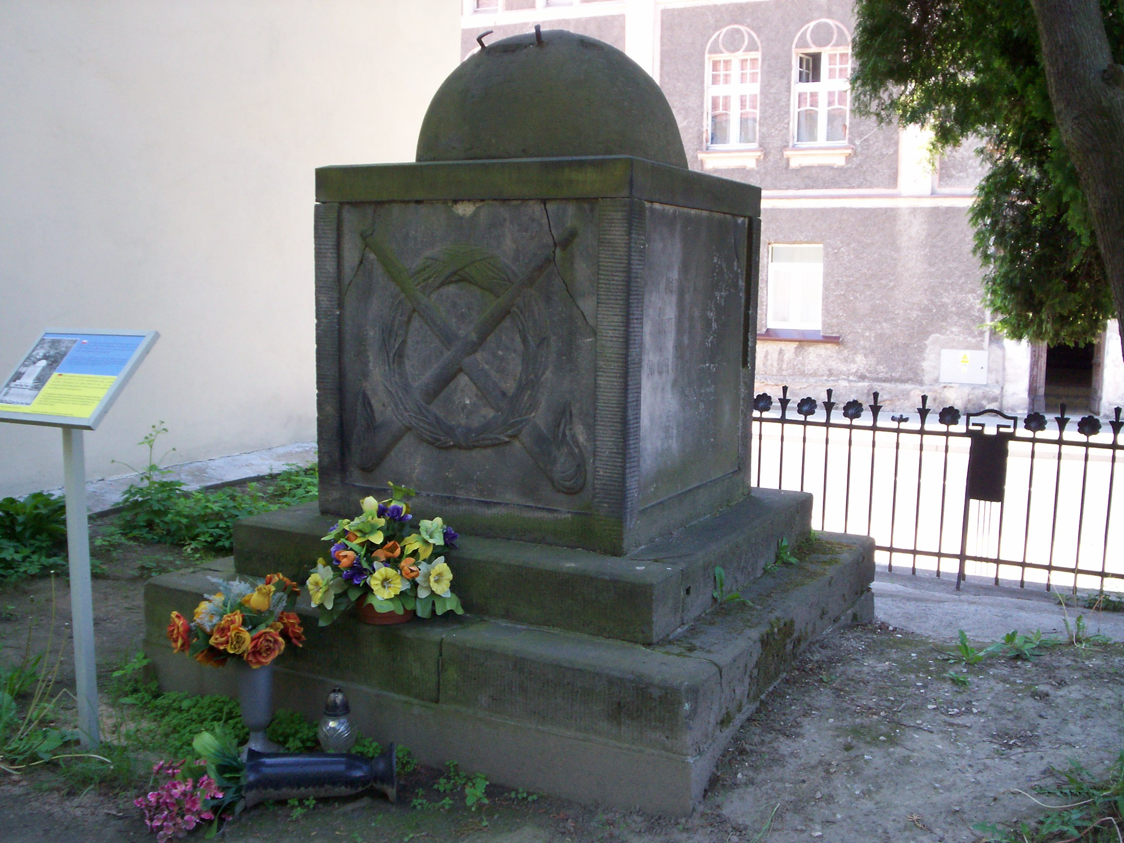 Gryfów Śląski, pomnik żołnierzy rosyjskich poległych w 1813.